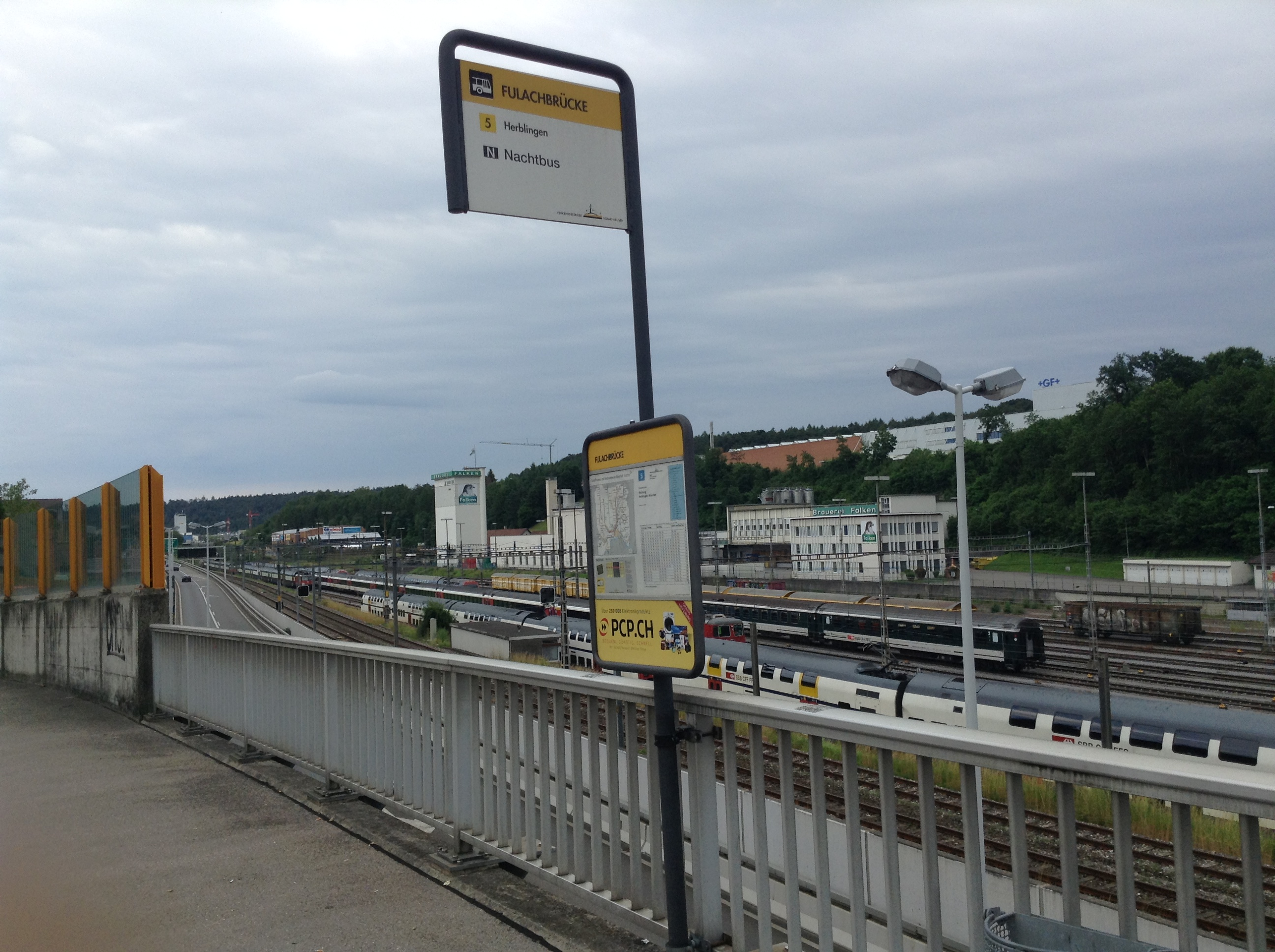 Eine Haltestelle der VBSH